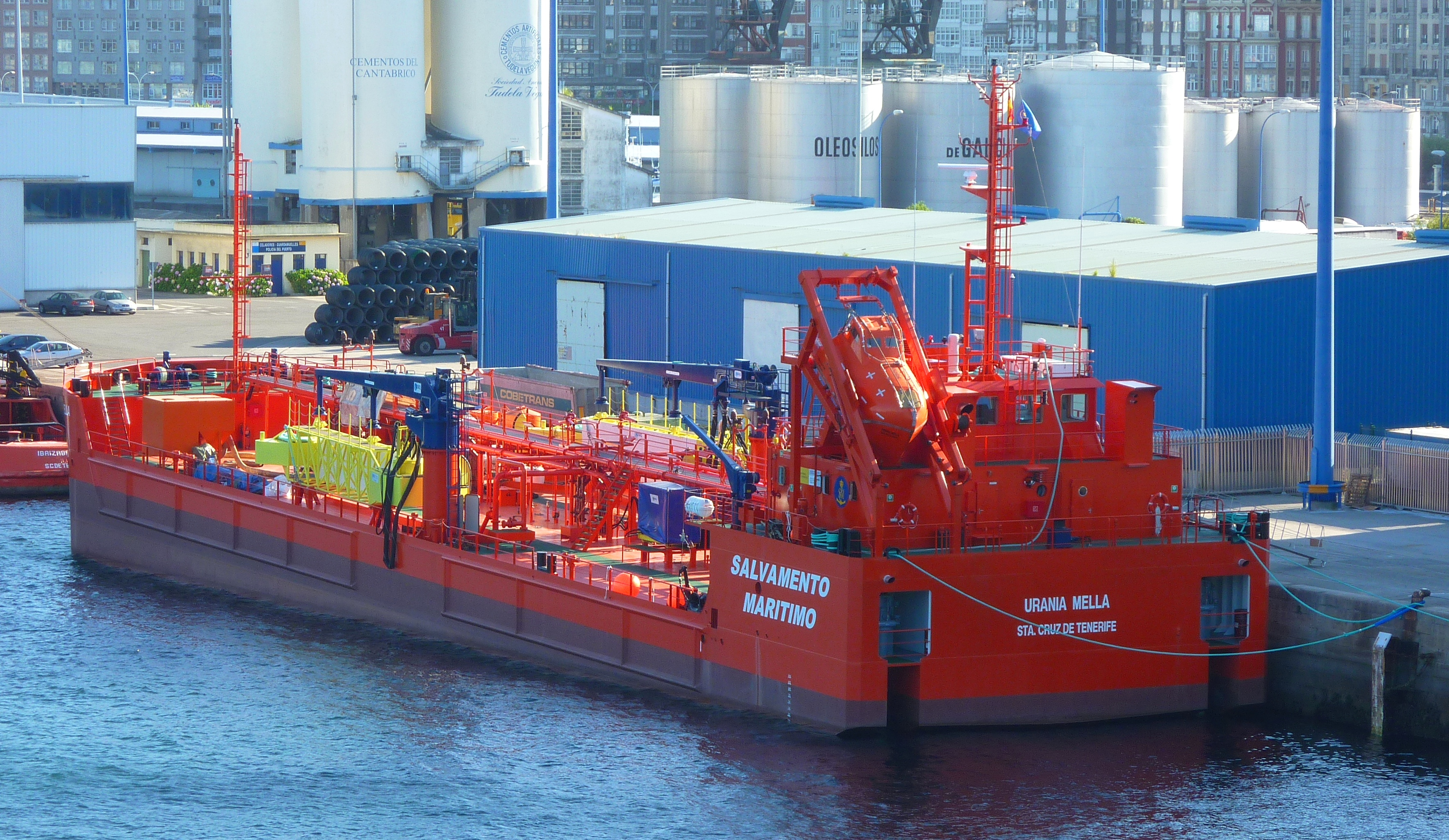 Buque de lucha contra la contaminación de la Sociedad Estatal de Salvamento y Seguridad Marítima "Urania Mella".